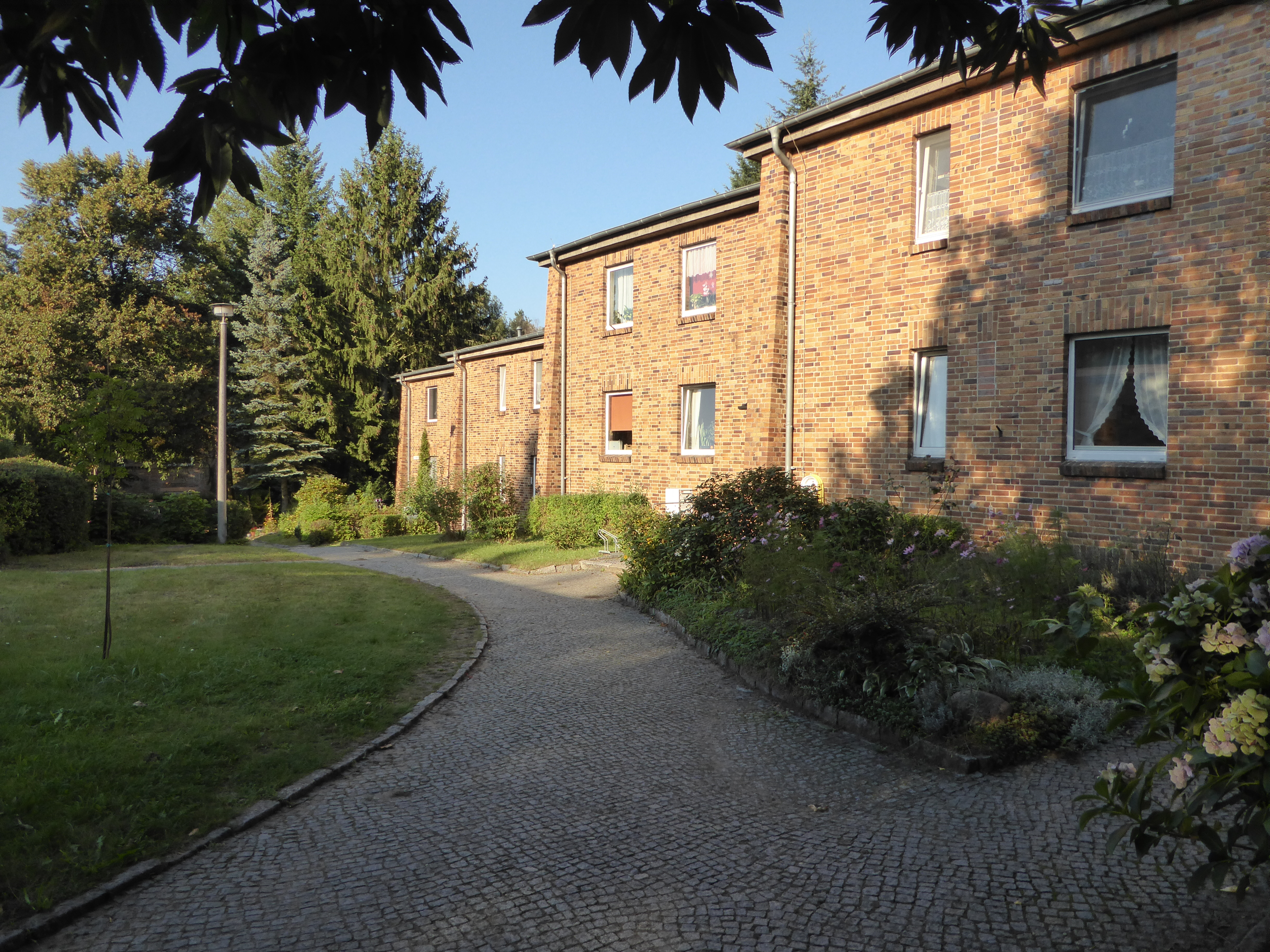 Wohngebiet Bernau der Wohnungsbaugenossenschaft „Aufbau“ Strausberg im September 2016 an. Vor der Verschmelzung zum 01.01.2018 bildete das Wohngebiet die Waldfriedener Wohnungsgenossenschaft eG Bernau (GEWAWO)